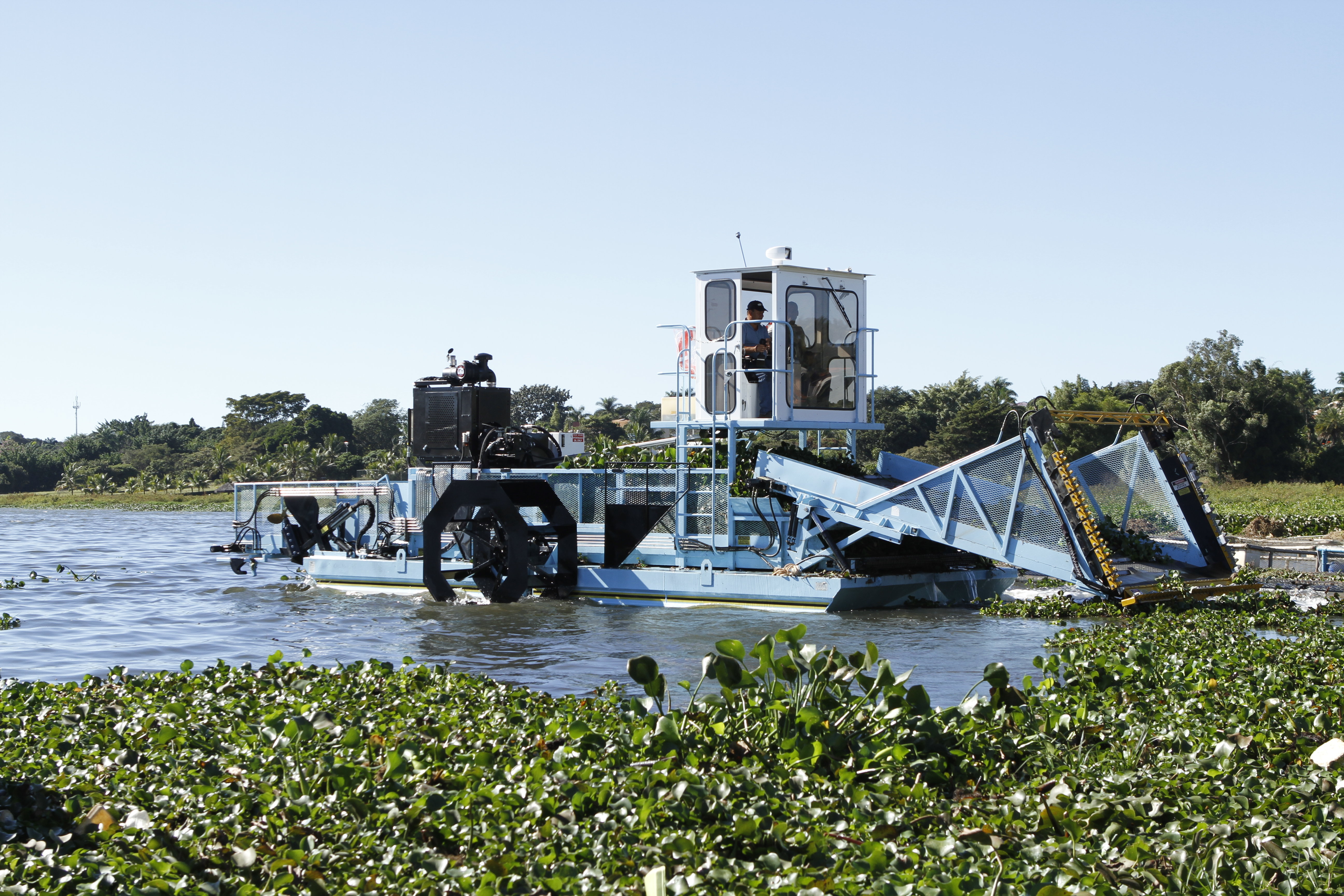 Papaguapé - coletando massa de macrófitas aquáticas